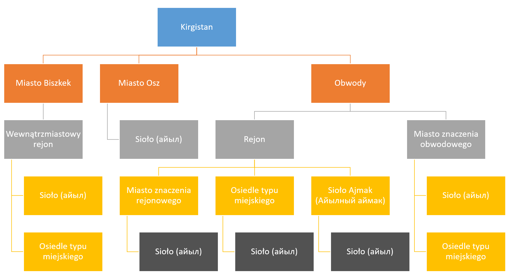 Schemat ukazujący podział administracyjny Kirgistanu